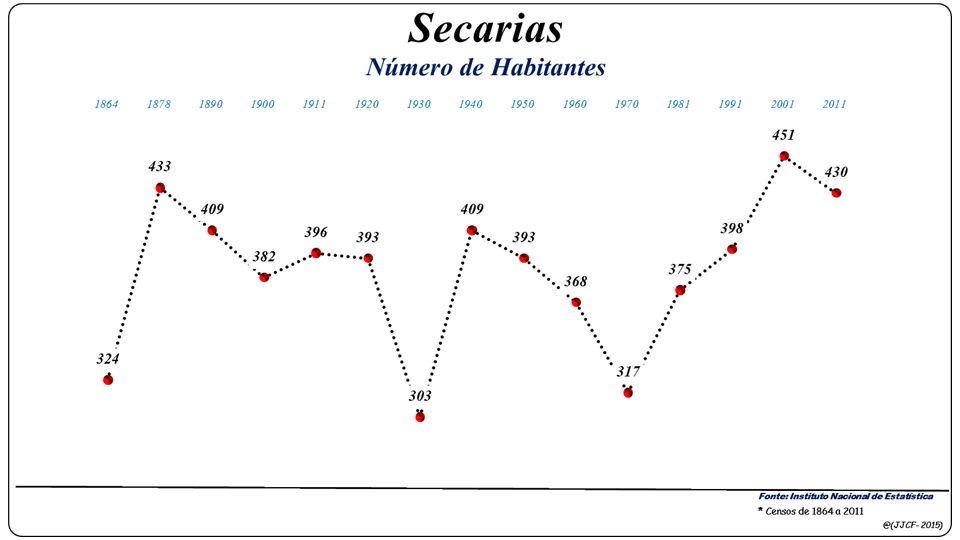 População